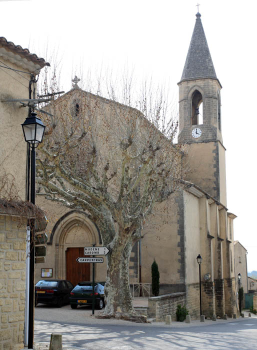 Village of Saint Pierre de Vassol in Vaucluse, France